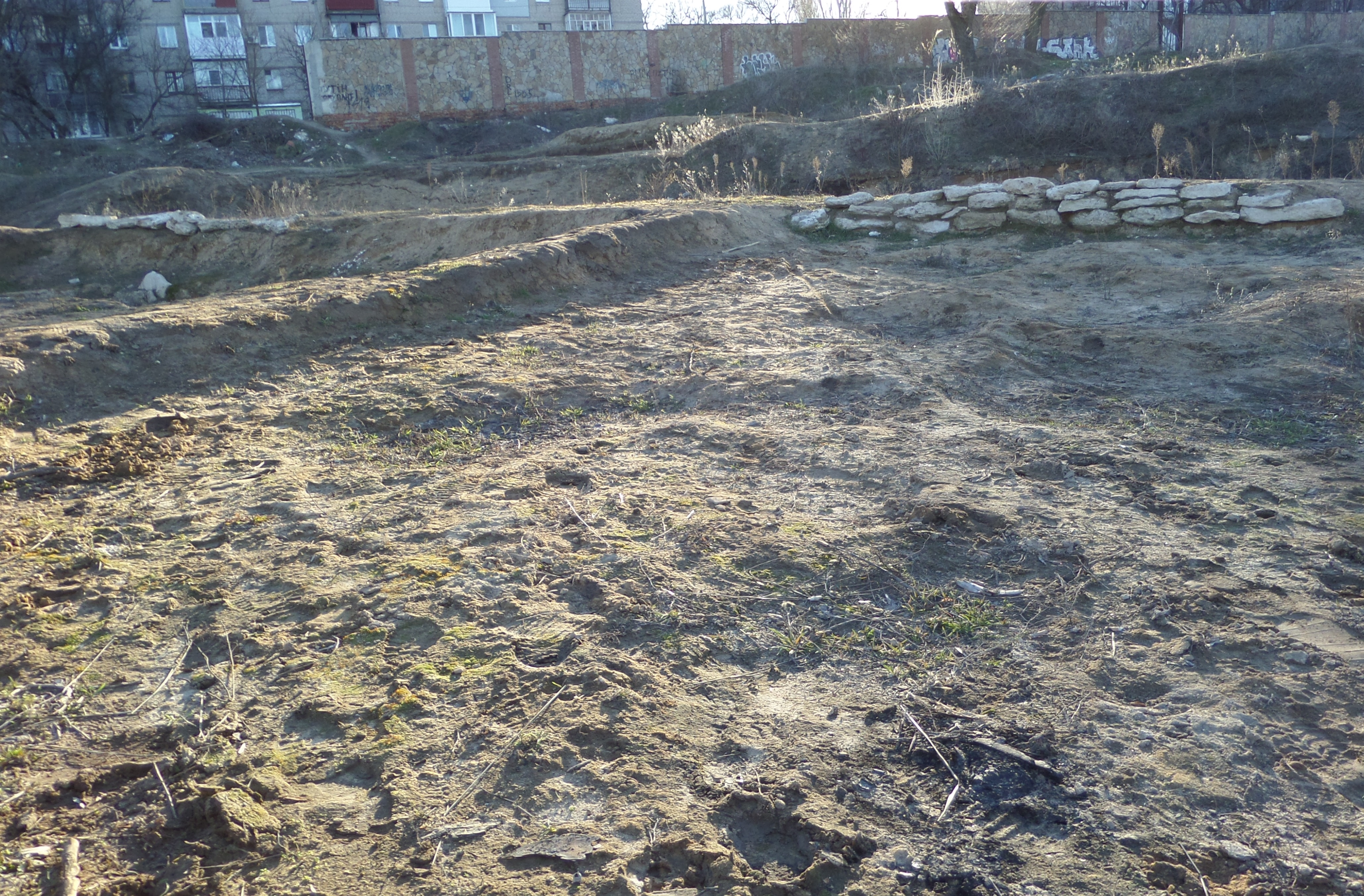 Дикий Сад в Николаеве (части стен киммерийских зданий).